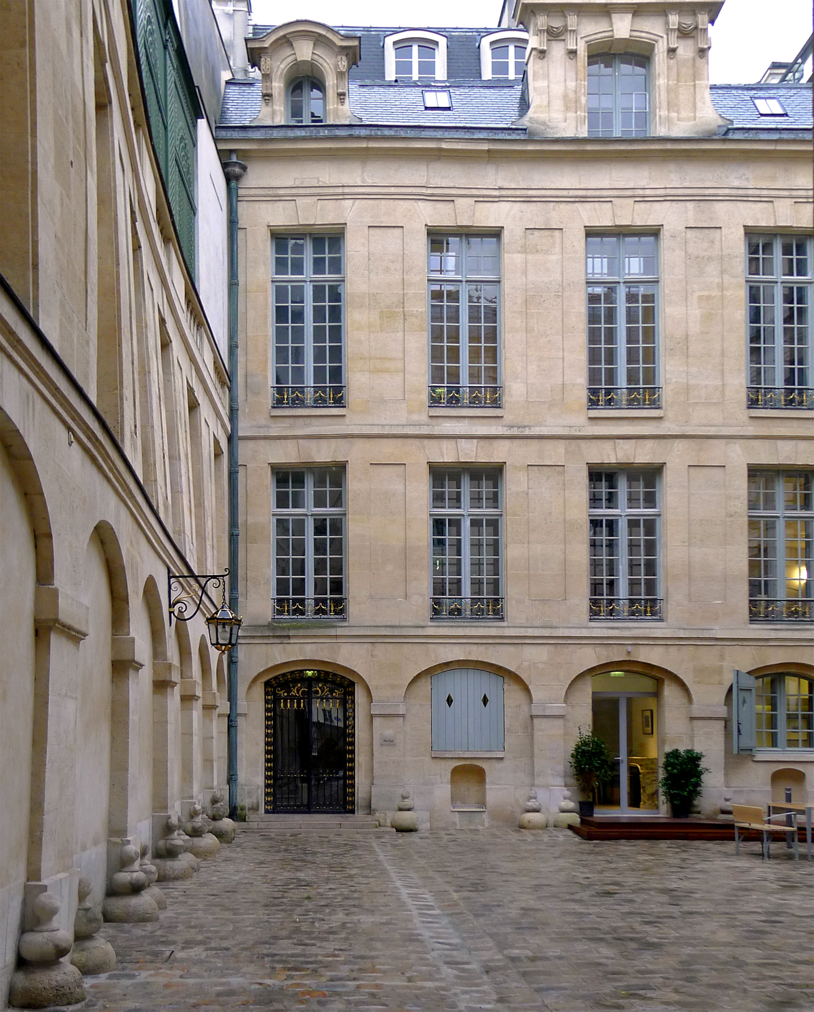 Cour intérieure de l'hôtel de Lauzun (n°17 quai d'Anjou, Paris IV)